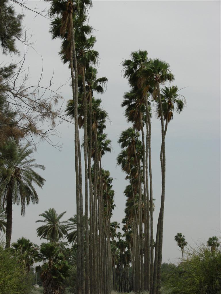 שדרת הוושינגטוניות בטירת צבי 7